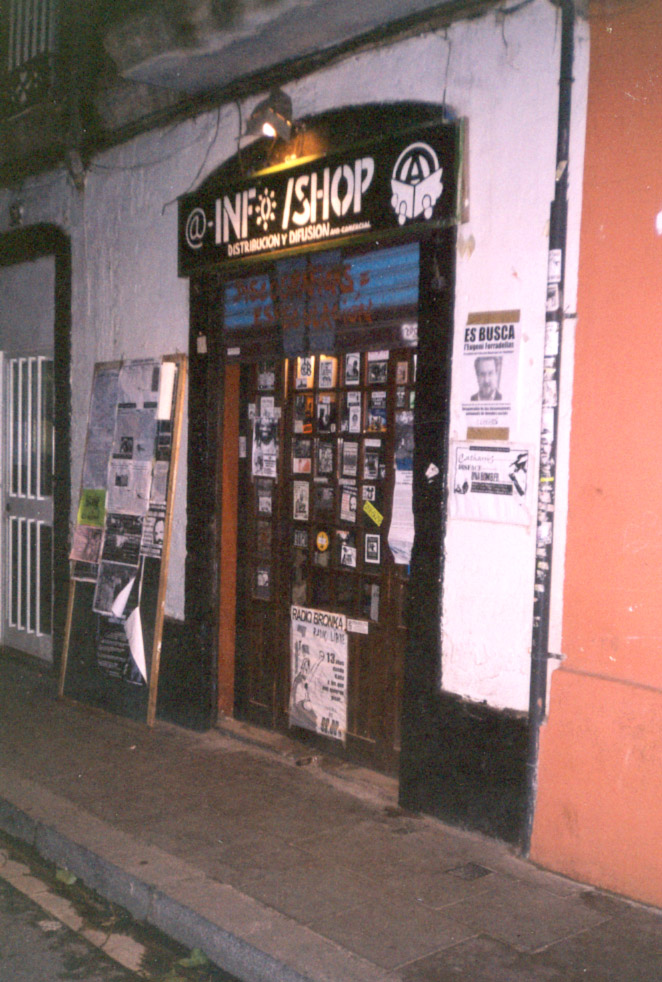 InfoShop del carrer Perill (Barcelona)